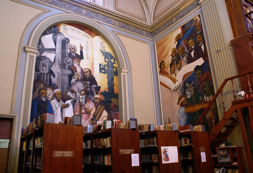 Biblioteca Pública de la Universidad Michoacana ubicada en Av. Madero Poniente esquina con Nigromante, Centro Histórico de Morelia, Michoacán, México. Fundada en 1930, conserva un fondo bibliográfico antiguo de 22,901 volúmenes, que van desde el siglo XV hasta principios del siglo XX. El edificio donde tiene su sede la biblioteca fue un templo de los Jesuitas durante la época del Virreinato de la Nueva España, construido en el siglo XVII en estilo barroco. En su interior la biblioteca conserva murales al fresco pintado a mediados del siglo XX por los artistas estadounidenses Hollis Howard Holbrook, S. C. Schoneberg y R. Hansen así como del mexicano Antonio Silva Díaz.